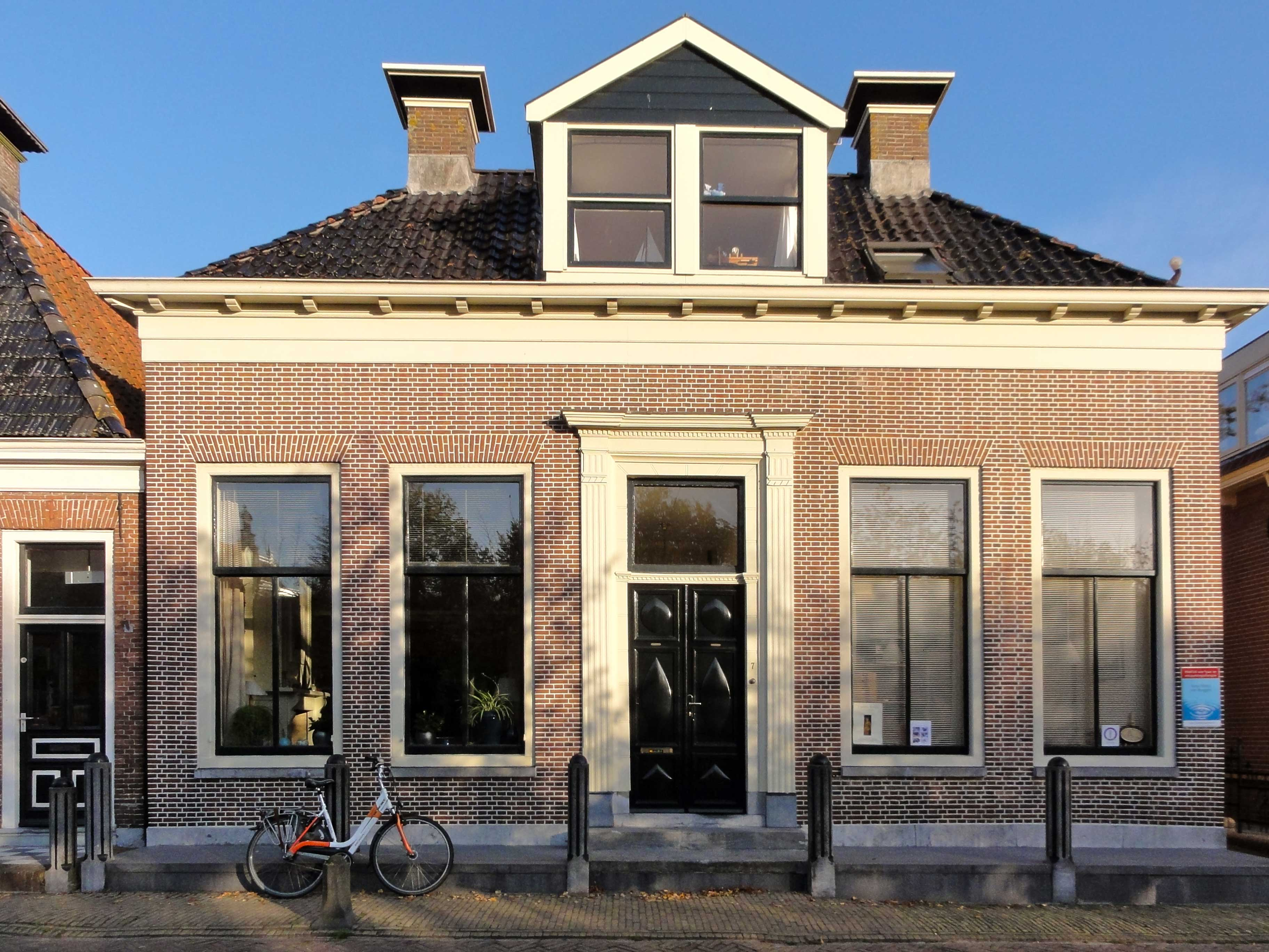 Meerweg 7 Balk